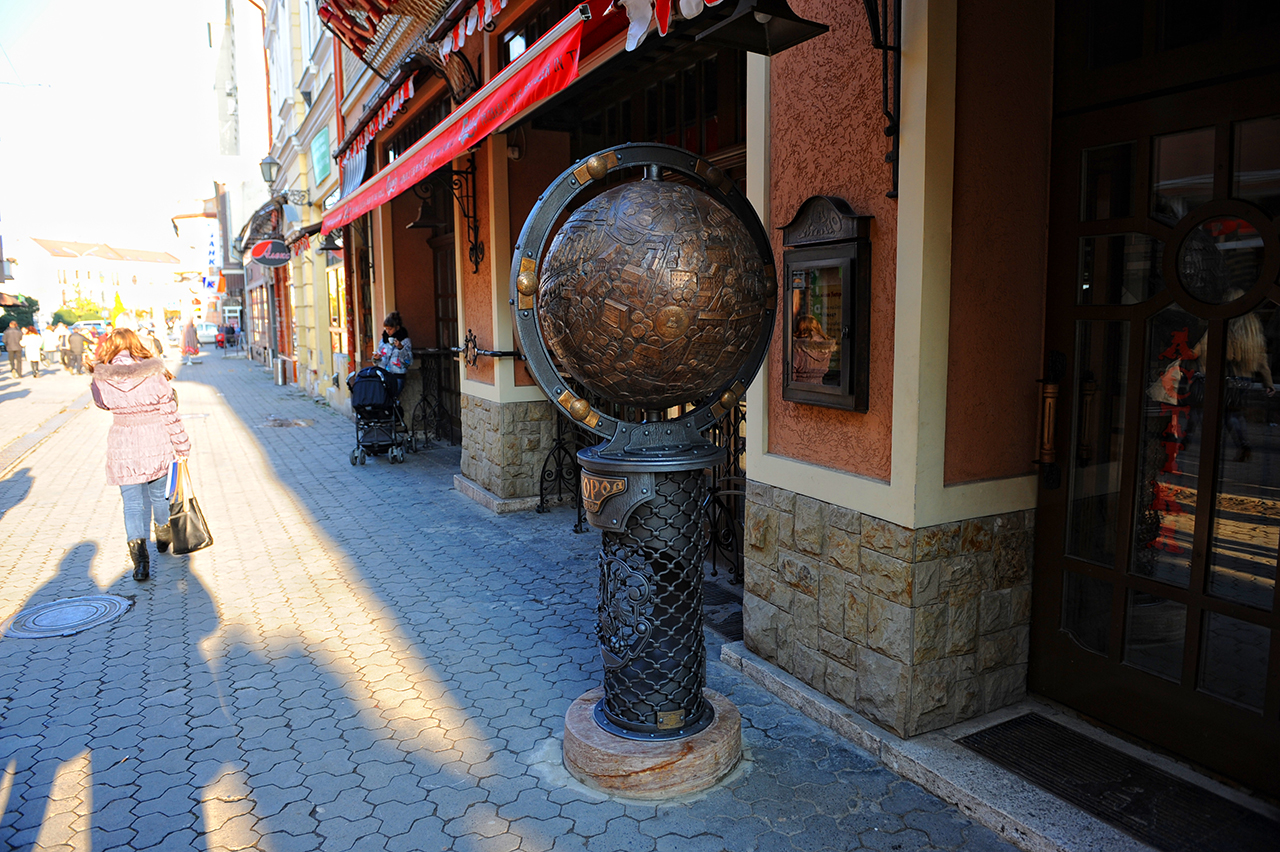 Глобус города